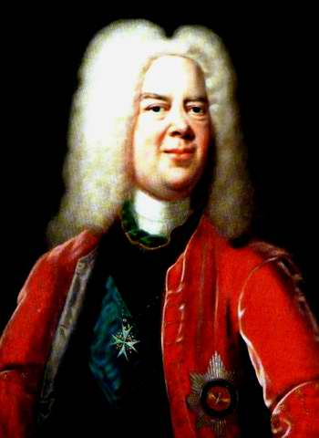 Louis Rudolph, Duke of Brunswick-Lüneburg